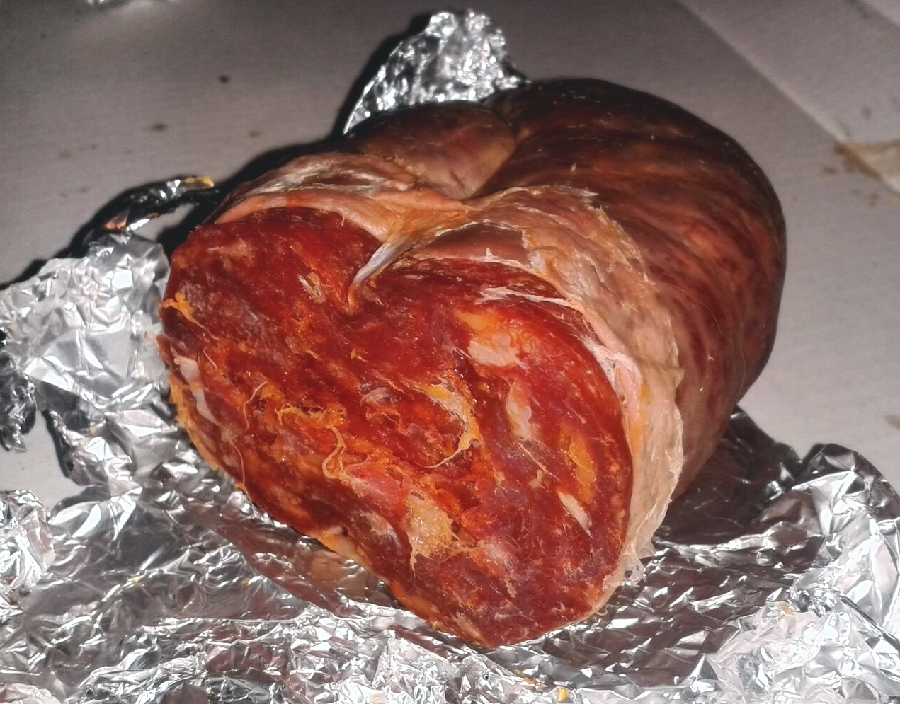 Soppressata